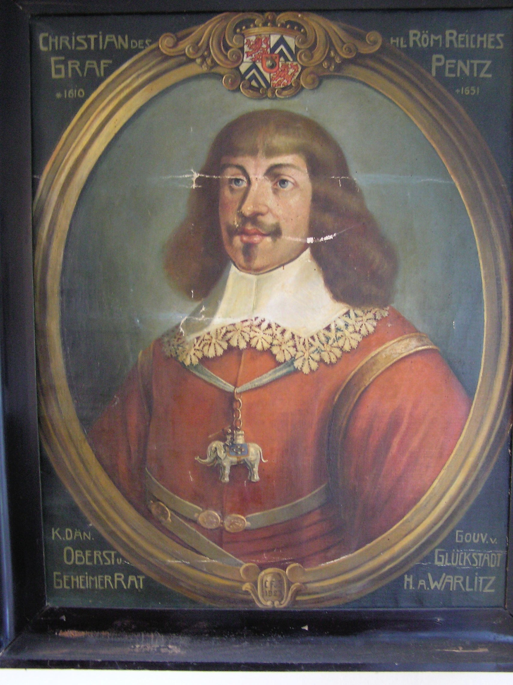 Reichsgraf Chrisitan von Pentz